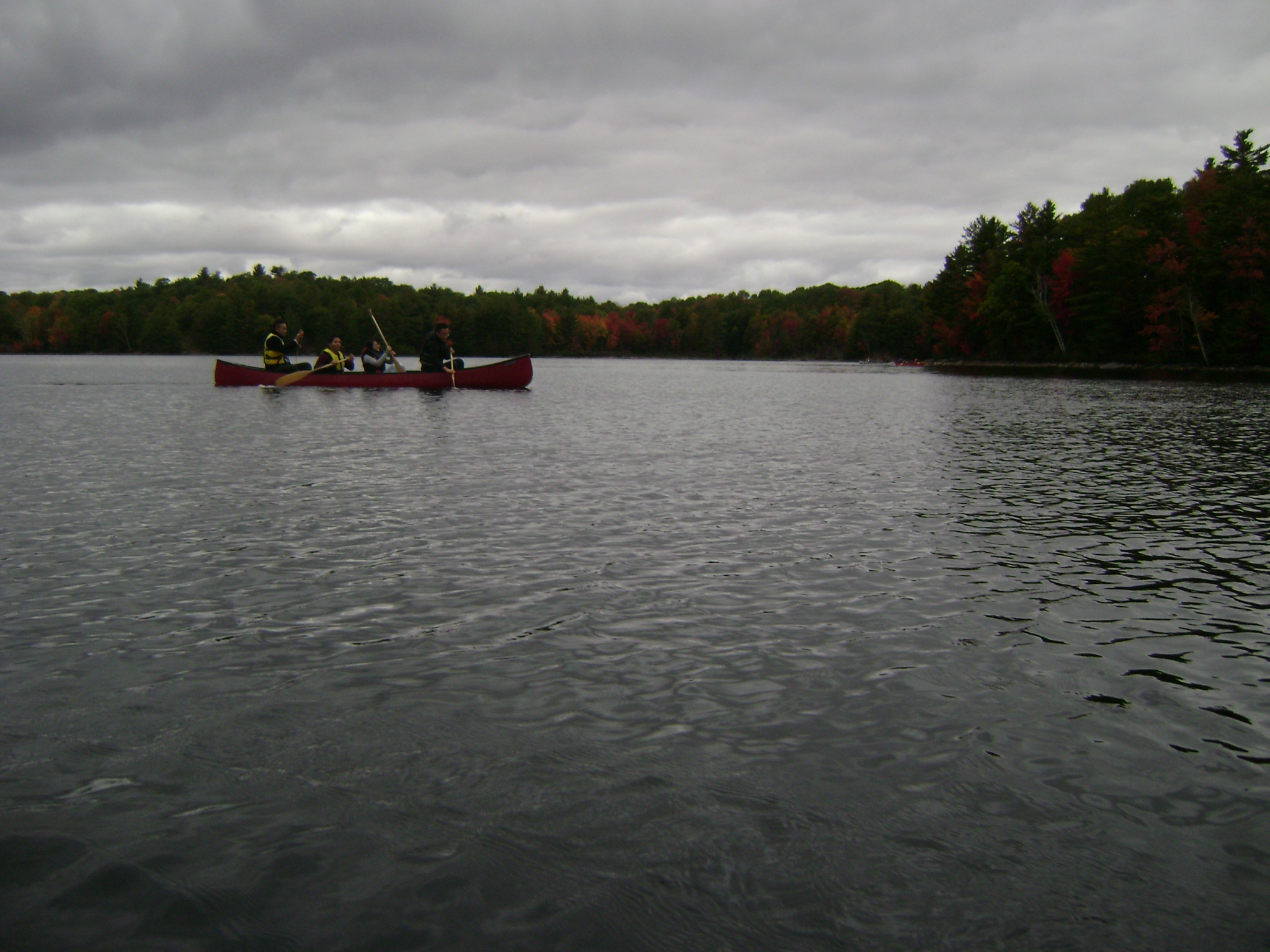 Lago para a prática de canoagem em Ontário, Canadá.